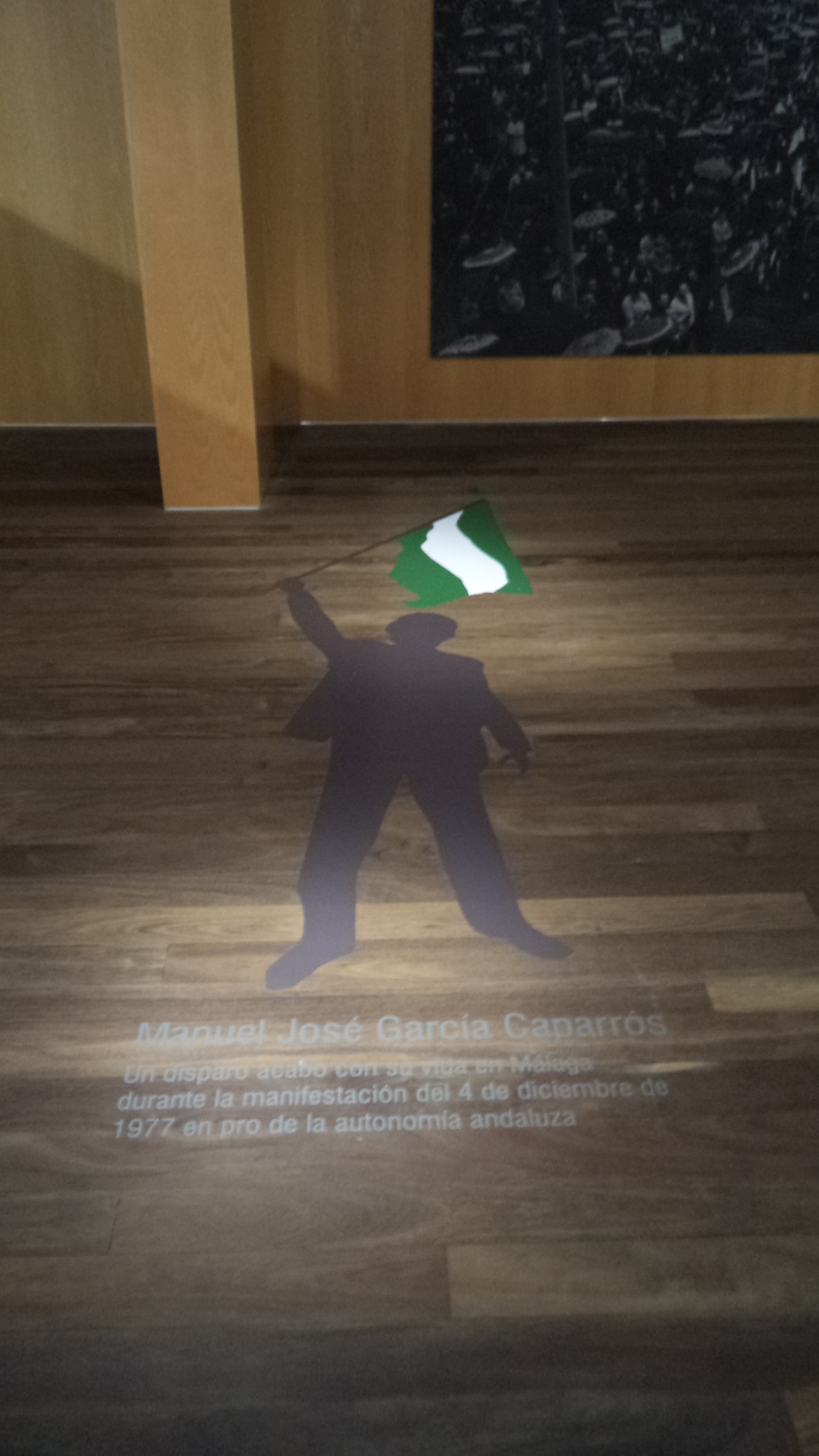 Silueta que representa a Manuel José García Caparrós. Recibió un disparo en Málaga en la manifestación del 4 de diciembre de 1977 por la autonomía de Andalucía. Se encuentra en el Museo de la Autonomía de Andalucía, en Coria del Río, Sevilla